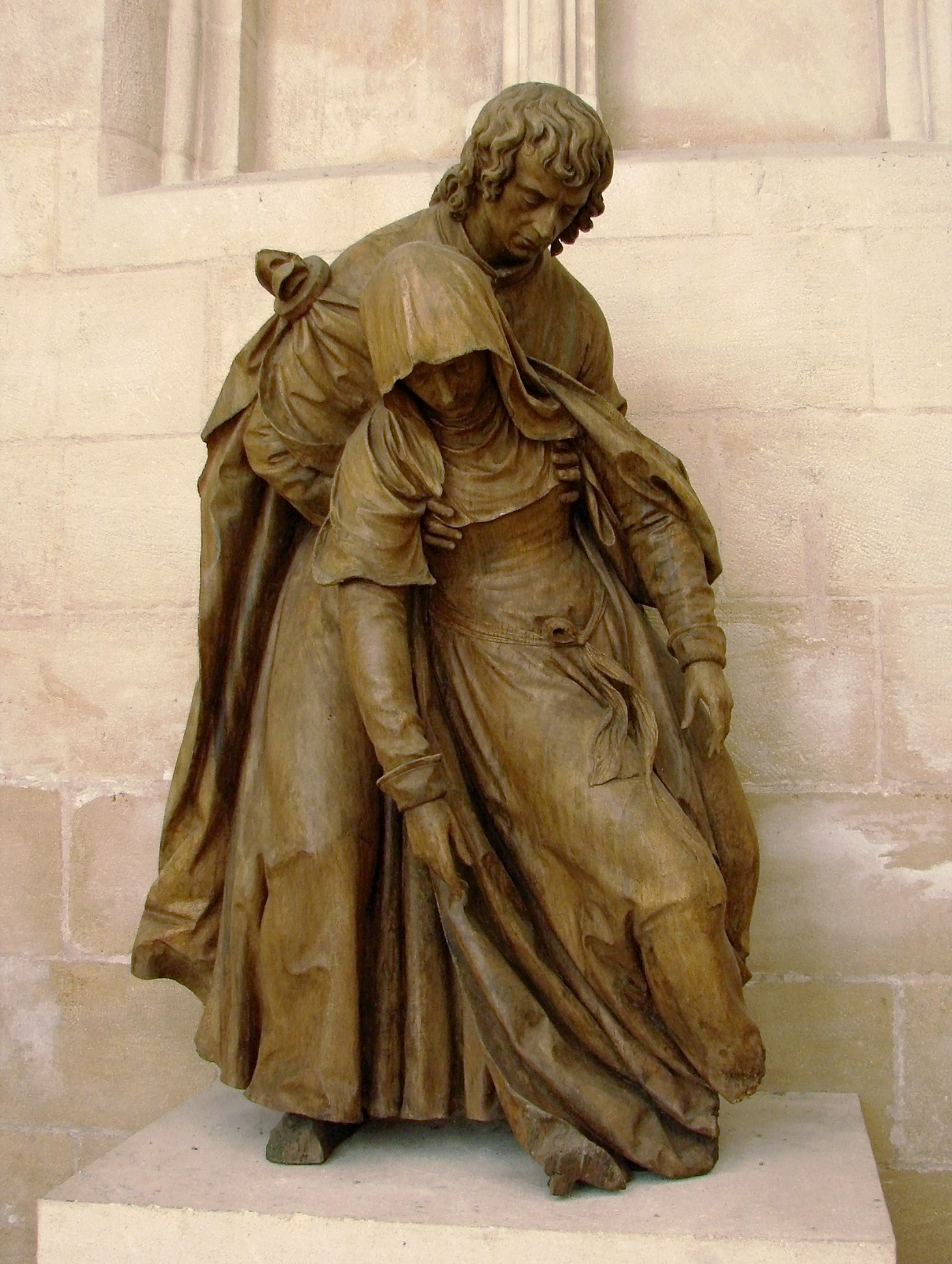 Pâmoison de la Vierge par Ligier Richier (1500-1567). Groupe en noyer, 1531. Eglise abbatiale Saint-Michel de Saint-Mihiel.